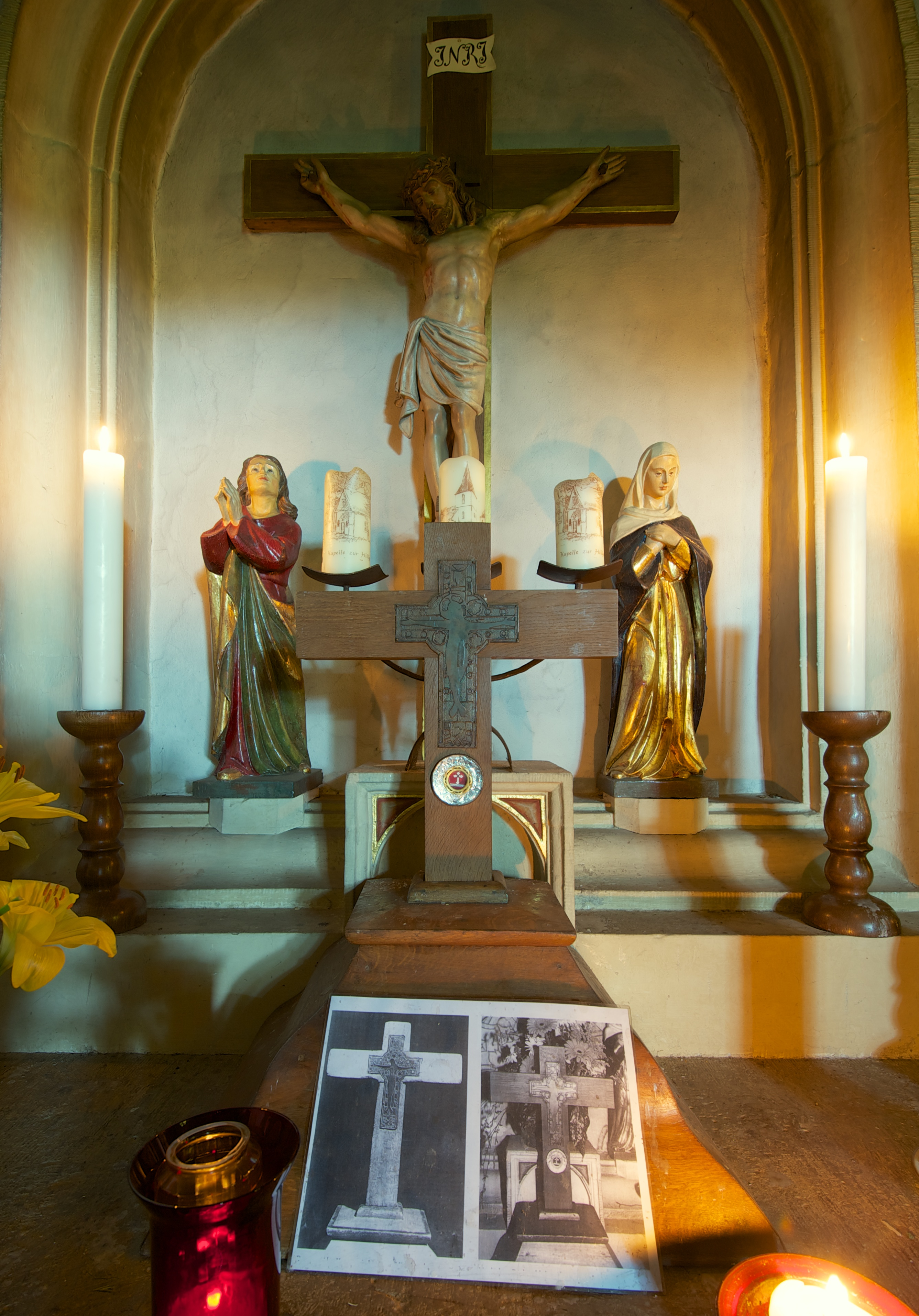 Nachbildung eines Kupferkreuzes von etwa 1200 aus Limoges mit Kreuzpartikel in der Kapelle zur hilligen Seele bei Paderborn.